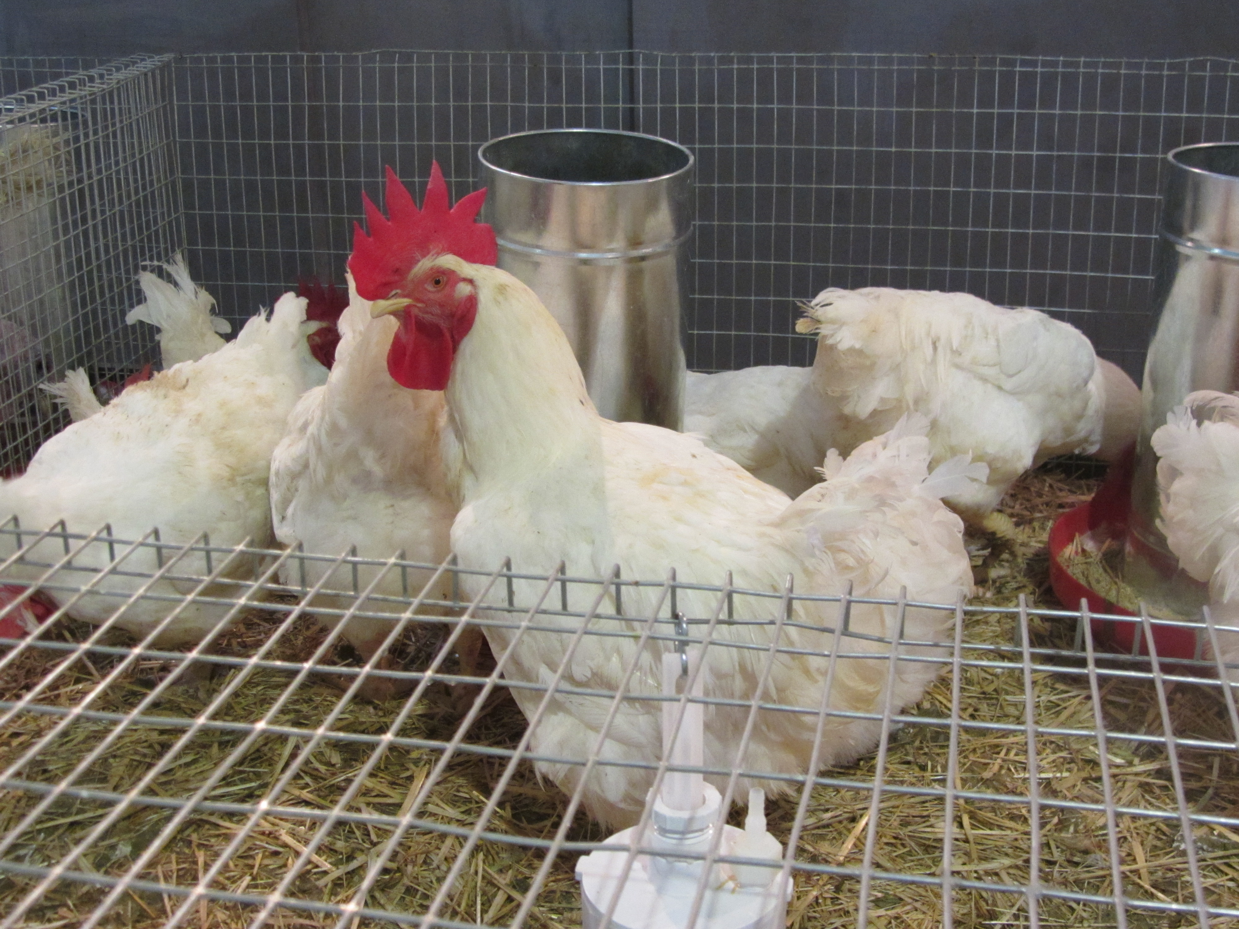 Volaille : reproducteur de type chair présenté au Salon International de l'Agriculture au Maroc